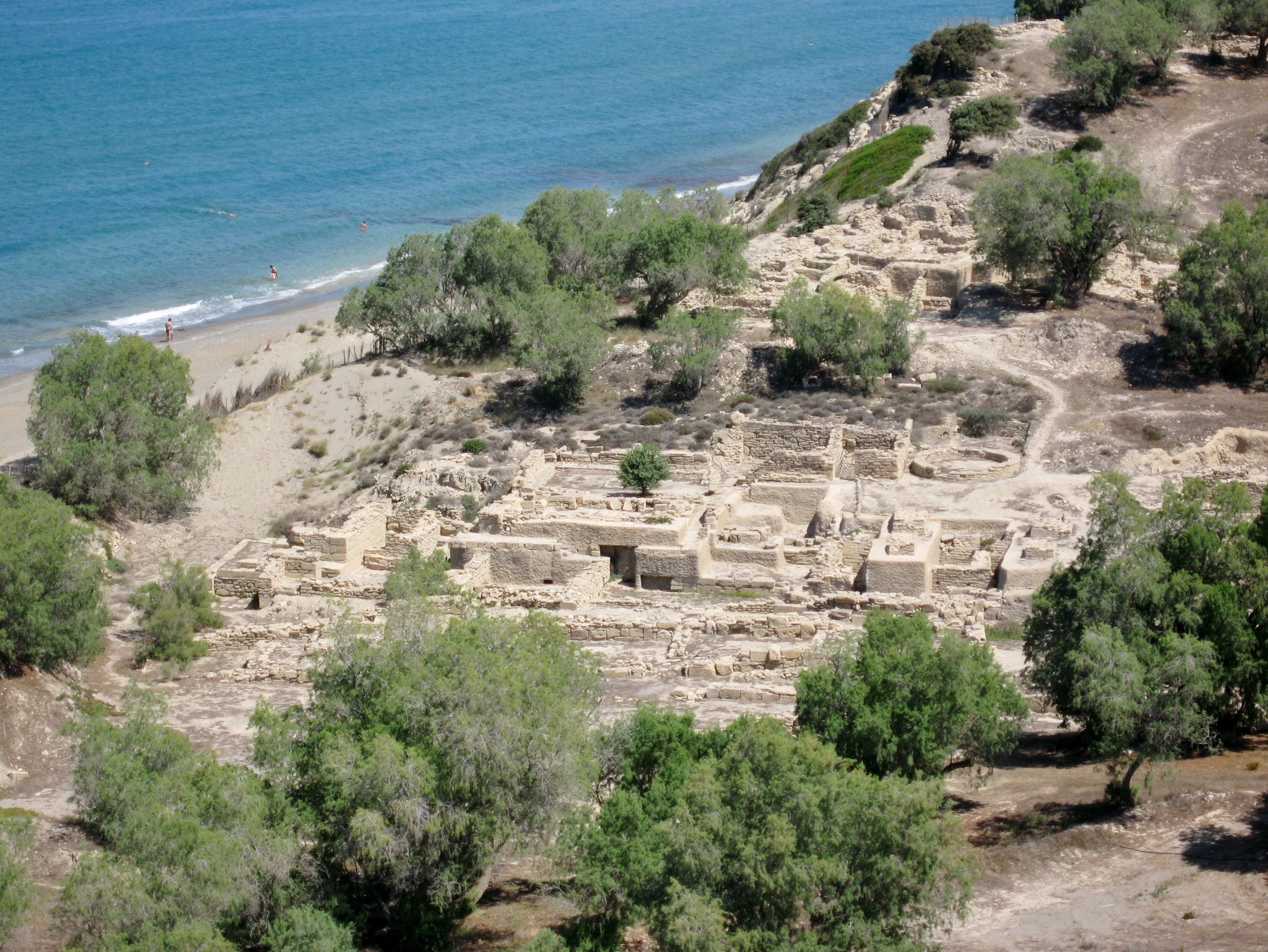 Komos, Nomos Iraklio, Crete, Greece